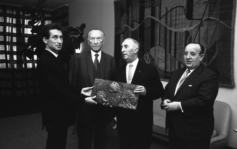 Richard Hey erhält den Hörspielpreis der Kriegsblinden (f. "Nachtprogramm") durch den Präs. des Bundes Deutscher Kriegsblinden, Dr. Ludwig (v.l.n.r.: Richard Hey, Konrad Adenauer, Dr. Ludwig, Hermann Höcherl)